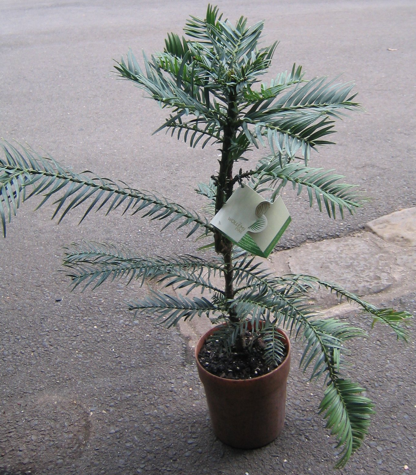 A Wollemi Pine sapling